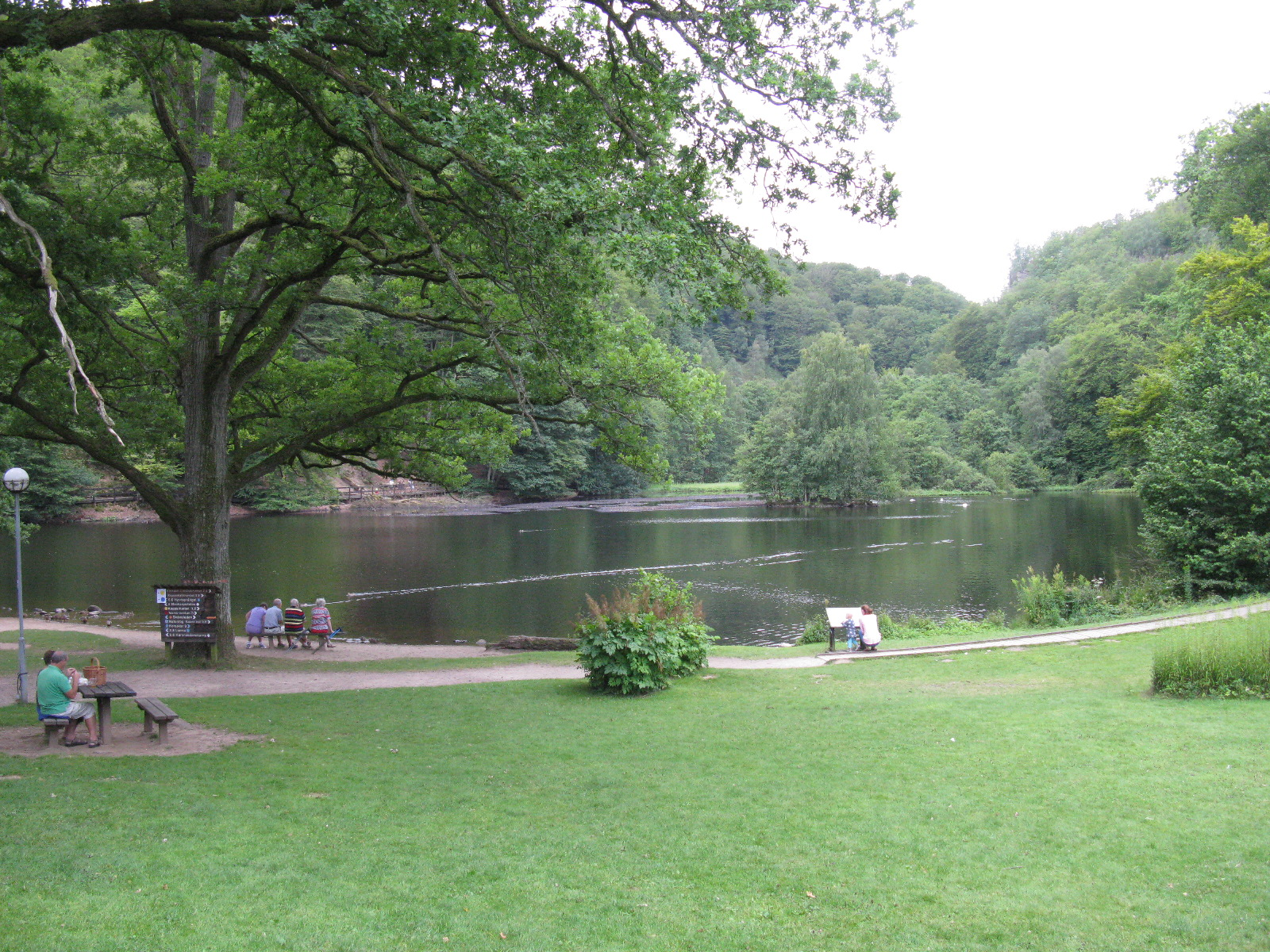 Skäralid,Söderåsen